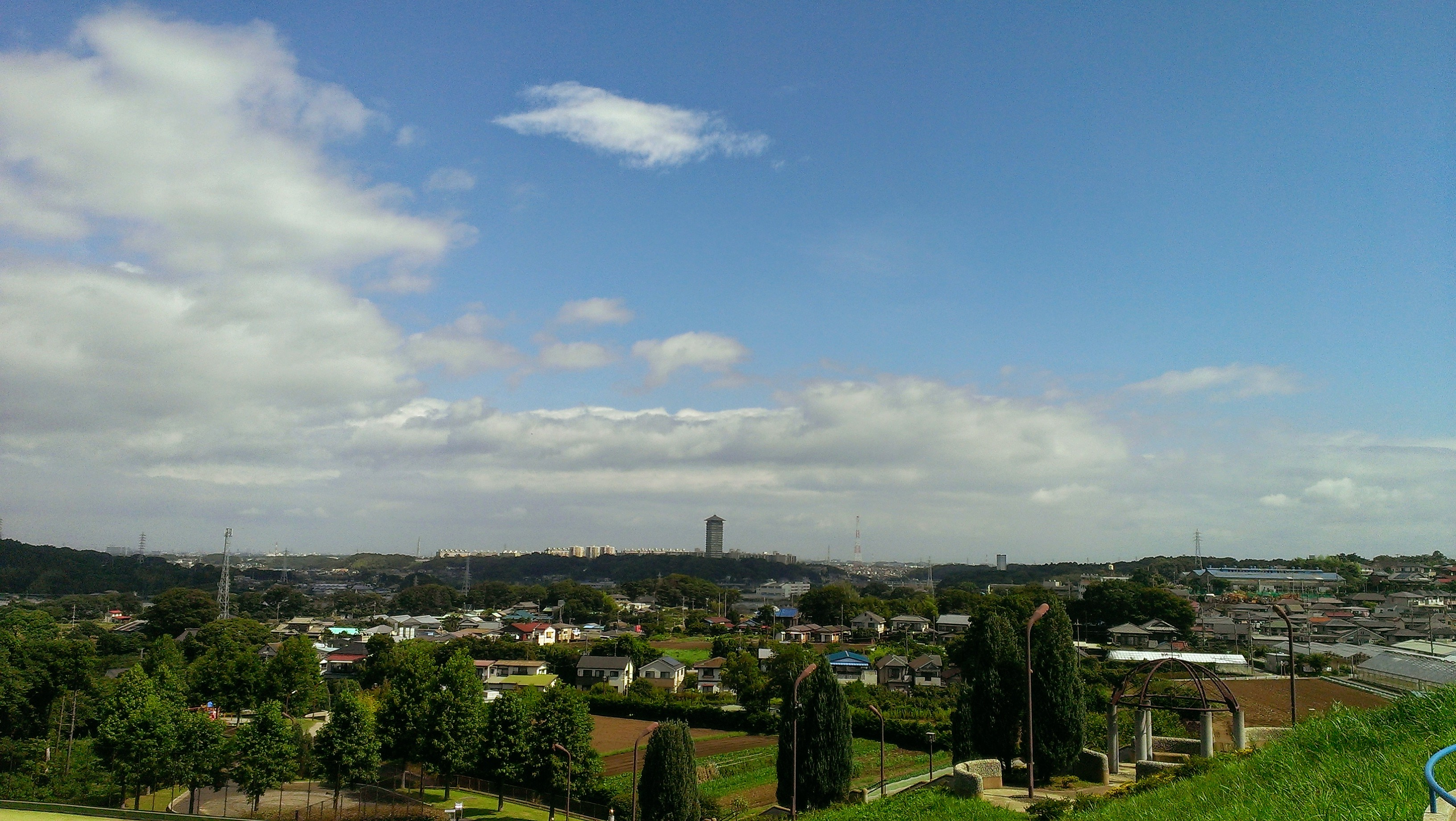 Higashimatanocho, Totsuka Ward, Yokohama, Kanagawa Prefecture 245-0065, Japan